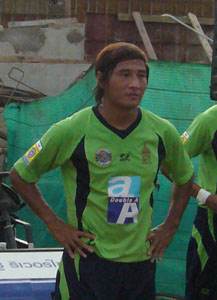 Masao Kiba